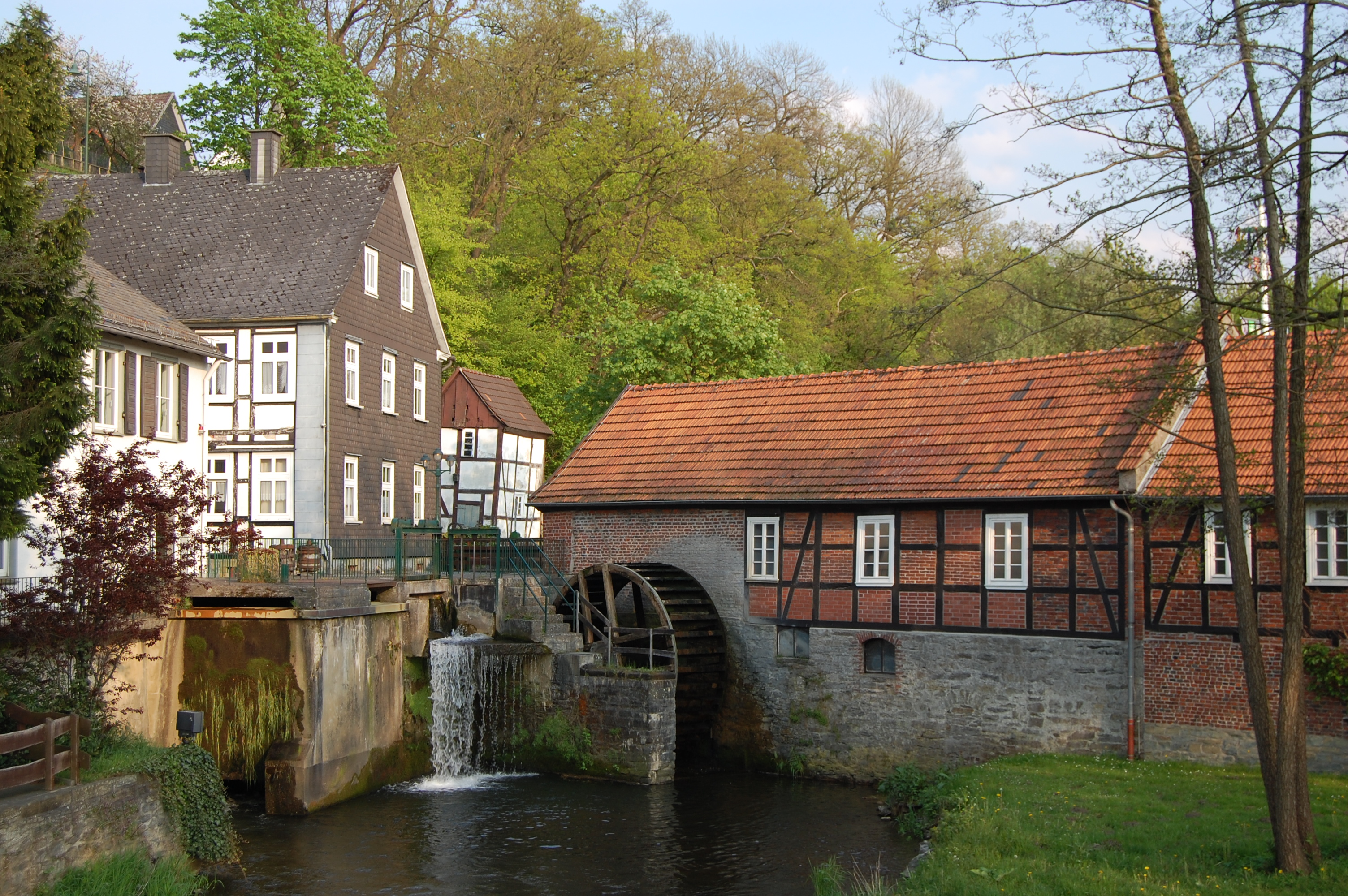 Stütings Mühle in Warstein-Belecke. Denkmalschutz seit 27. November 1984.